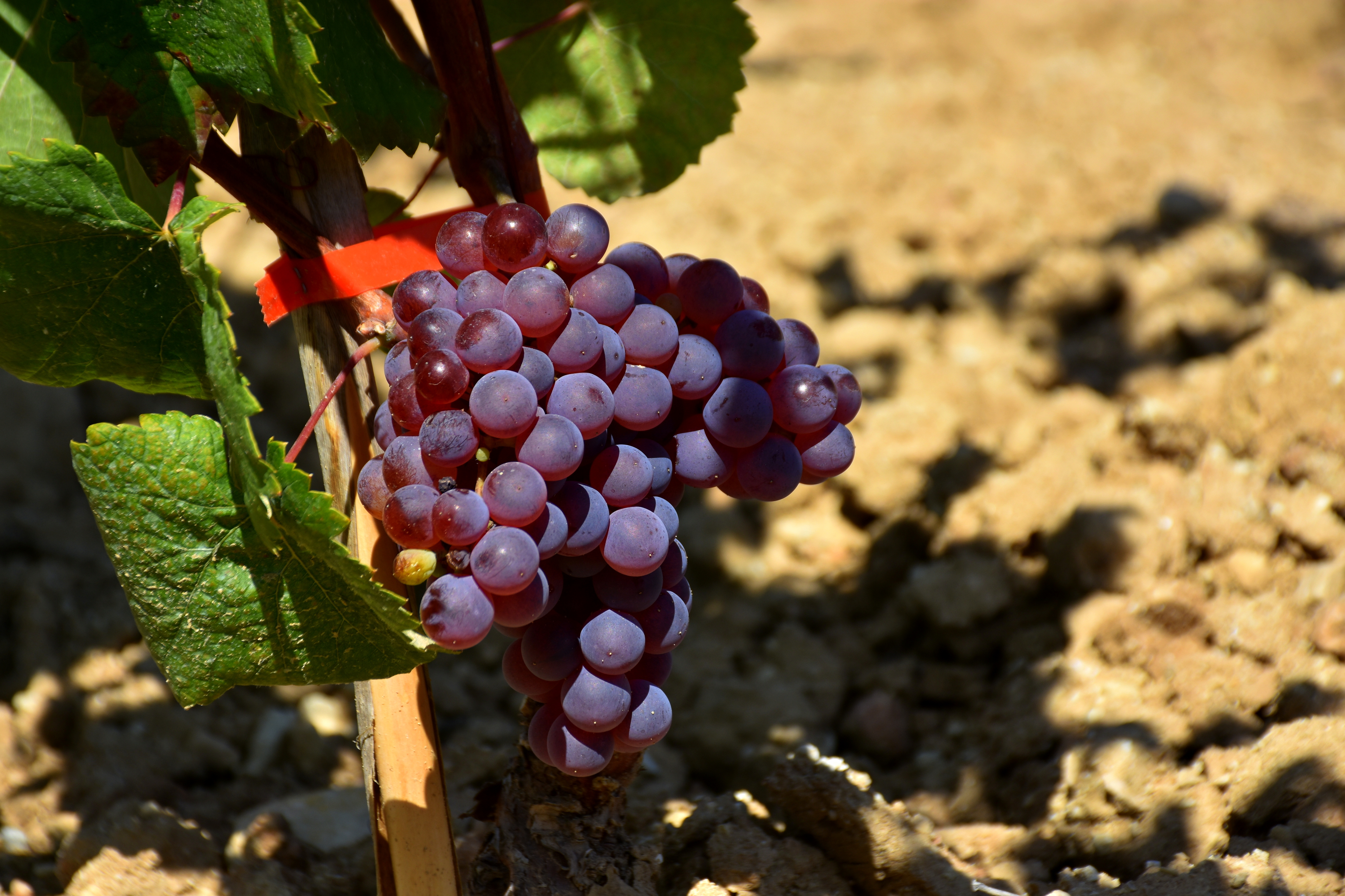 Raïms de xarel·lo vermell. Torrelles de Foix (Alt Penedès).